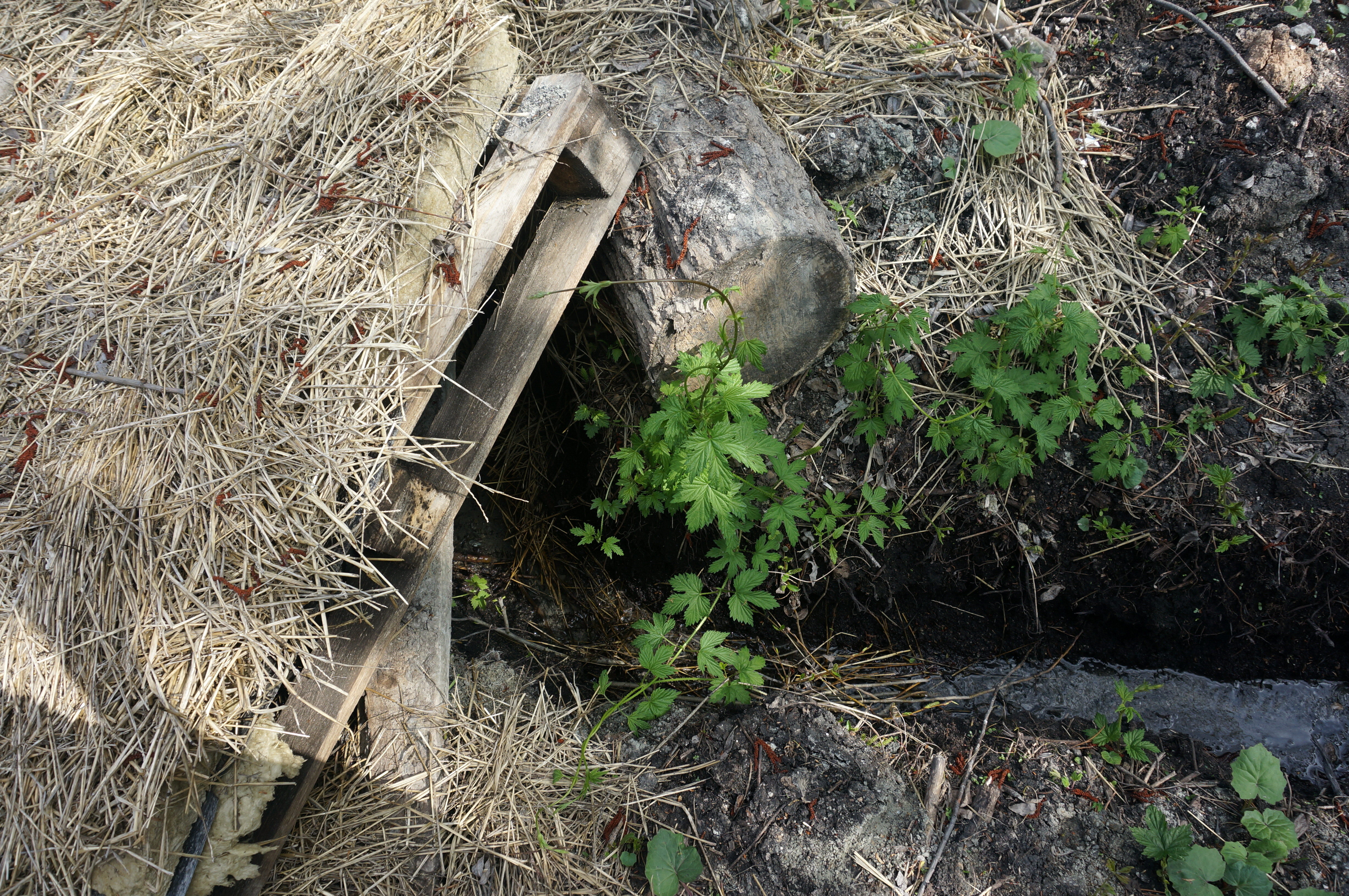 Родник в окрестностях с. Чубовка, Кинельский район Самарской области This image is related to the protected area of Russia number 6310840